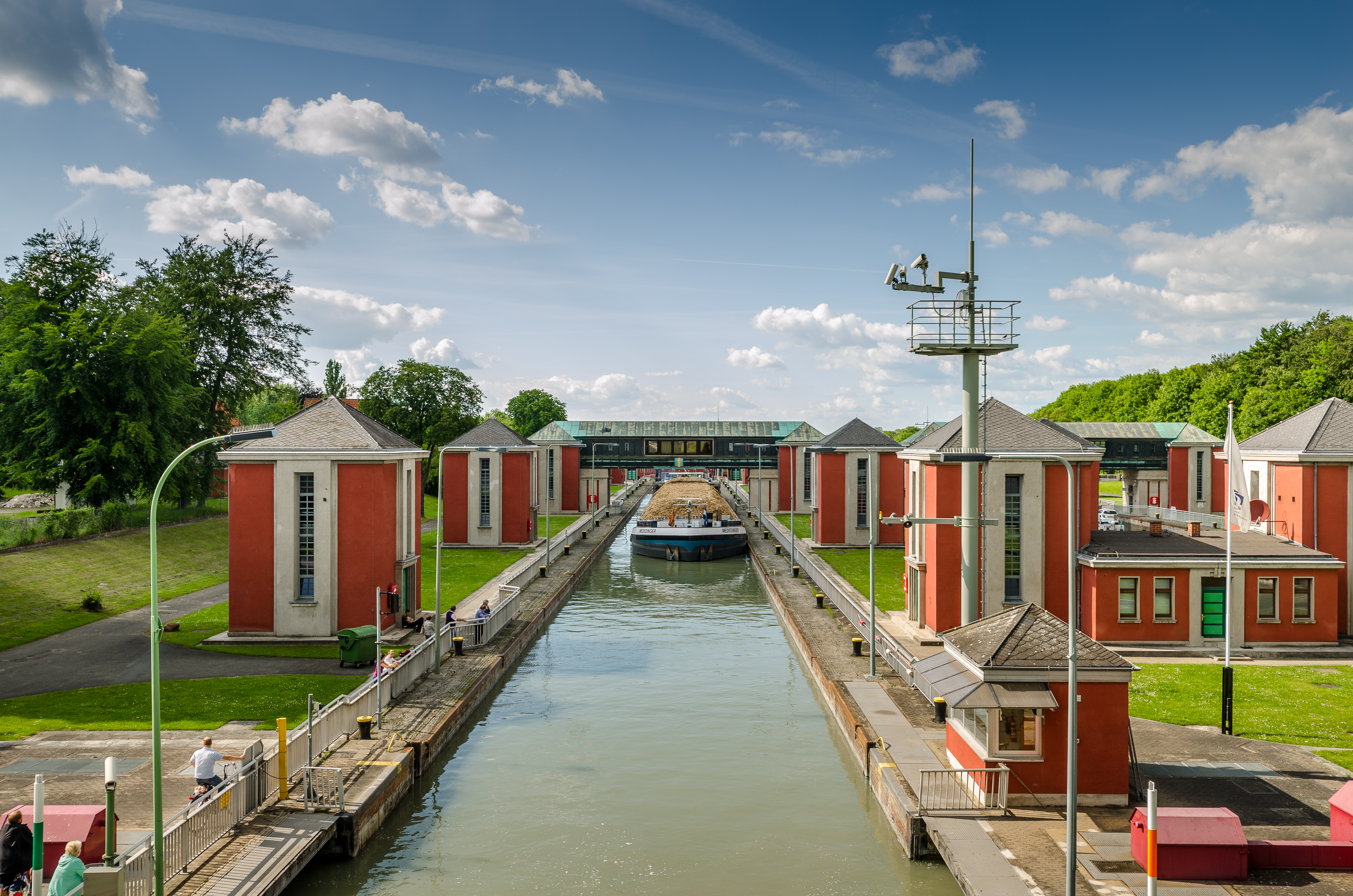 Schleuse mit Schiff